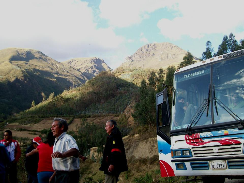 Un Viaje Encantador